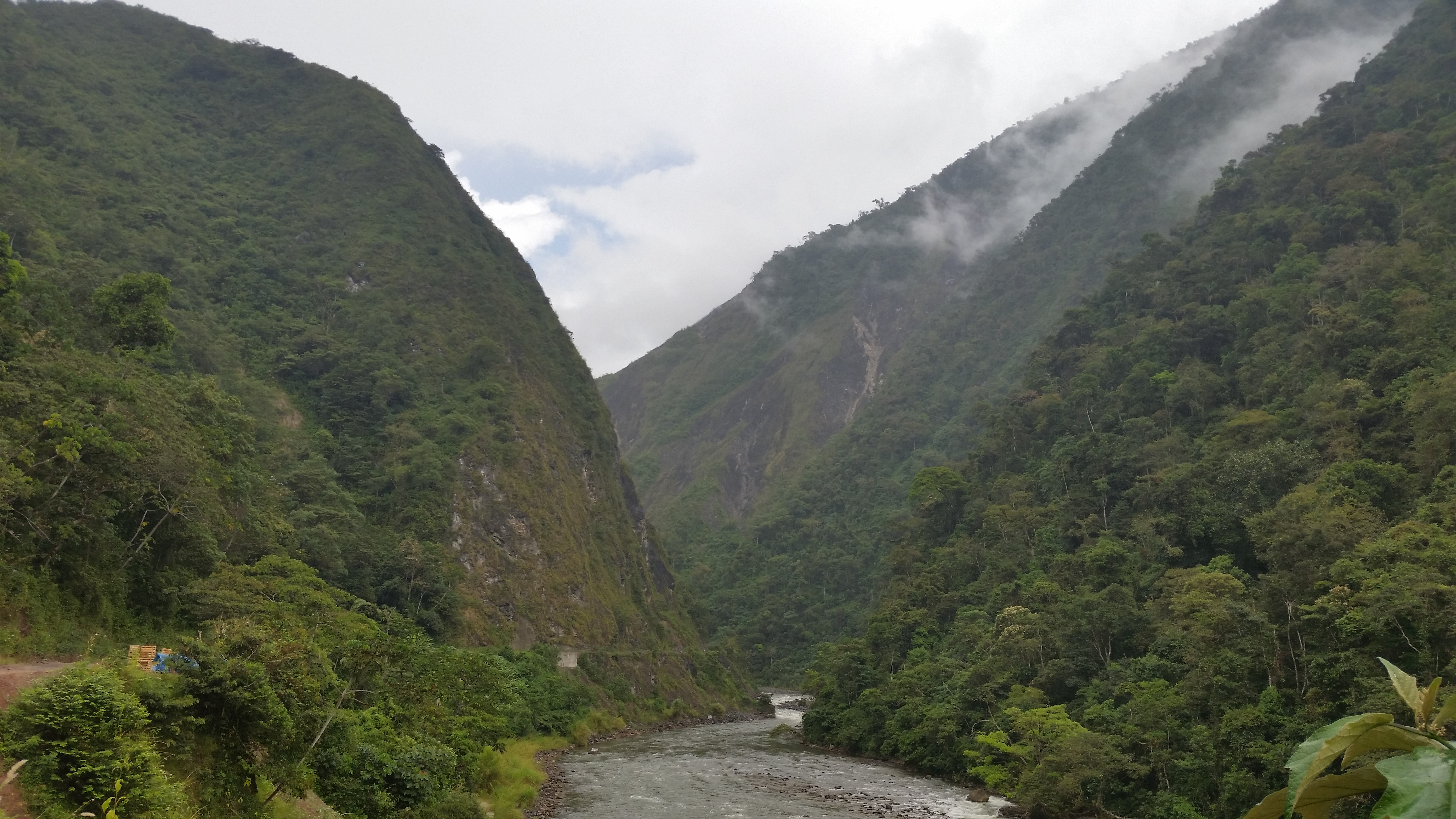 Quebrada Huancabamba